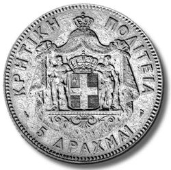 Νόμισμα των 5 δραχμών της Κρητικής Πολιτείας, 1901. Ήταν διαμέτρου 37 χιλιοστών και βάρους 25 γραμμαρίων από ασήμι 0,900. Η άλλη όψη εικονίζει την κεφαλή του πρίγκηπα Γεωργίου, με την επιγραφή "ΠΡΙΓΚΗΨ ΓΕΩΡΓΙΟΣ ΤΗΣ ΕΛΛΑΔΟΣ ΥΠΑΤΟΣ ΑΡΜΟΣΤΗΣ ΕΝ ΚΡΗ-ΤΗ", ημερομηνία. Κόπηκε σε 150.000 κομμάτια σε νομισματοκοπείο του Παρισιού.